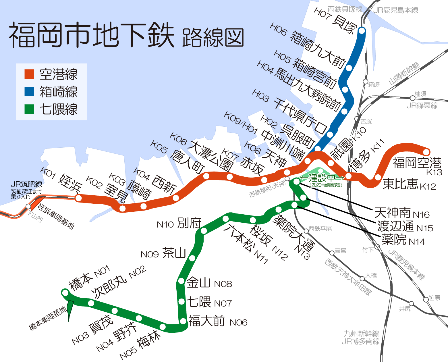 福岡市営地下鉄路線図